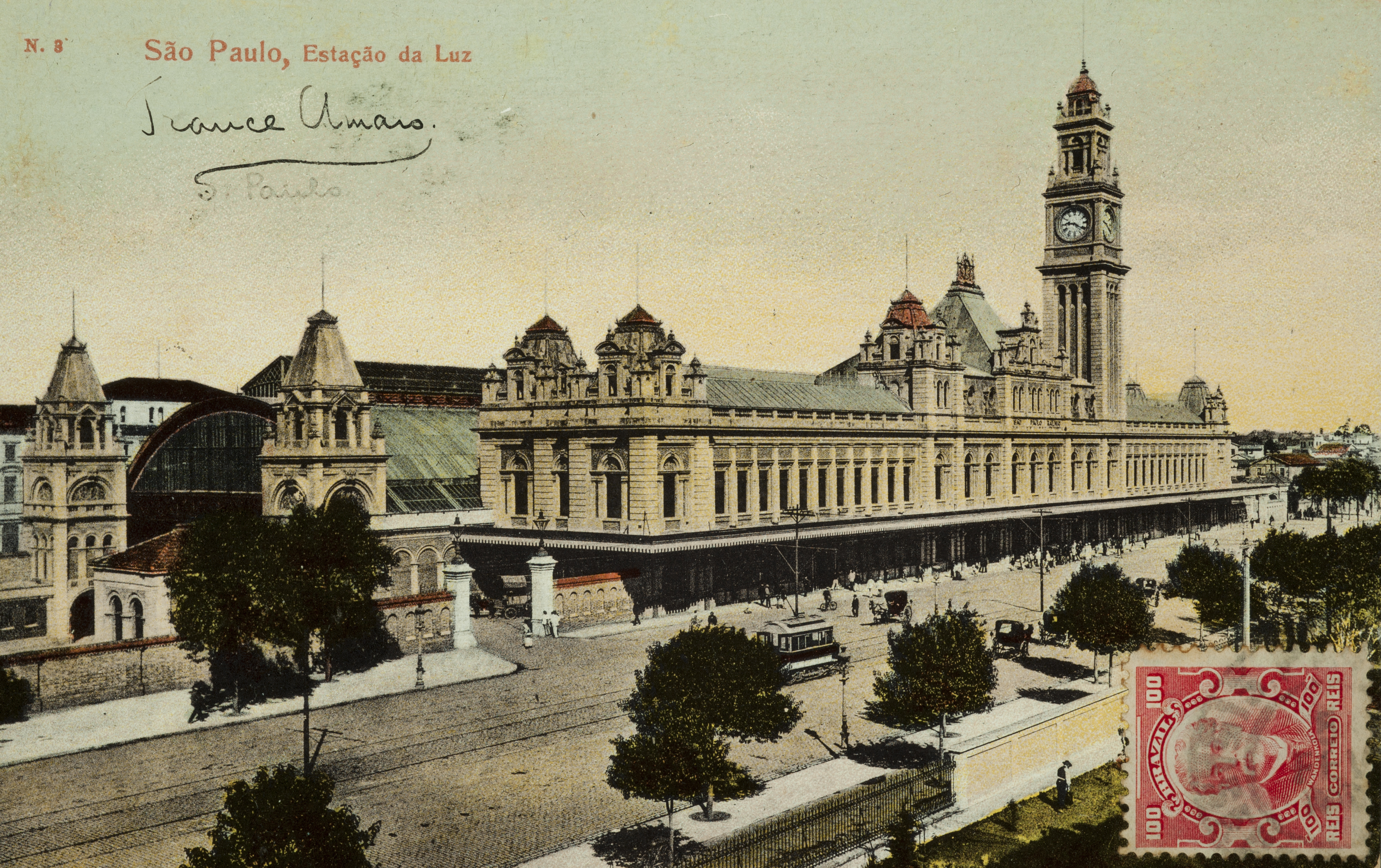 Obra que integra o acervo do Museu Paulista da USP.